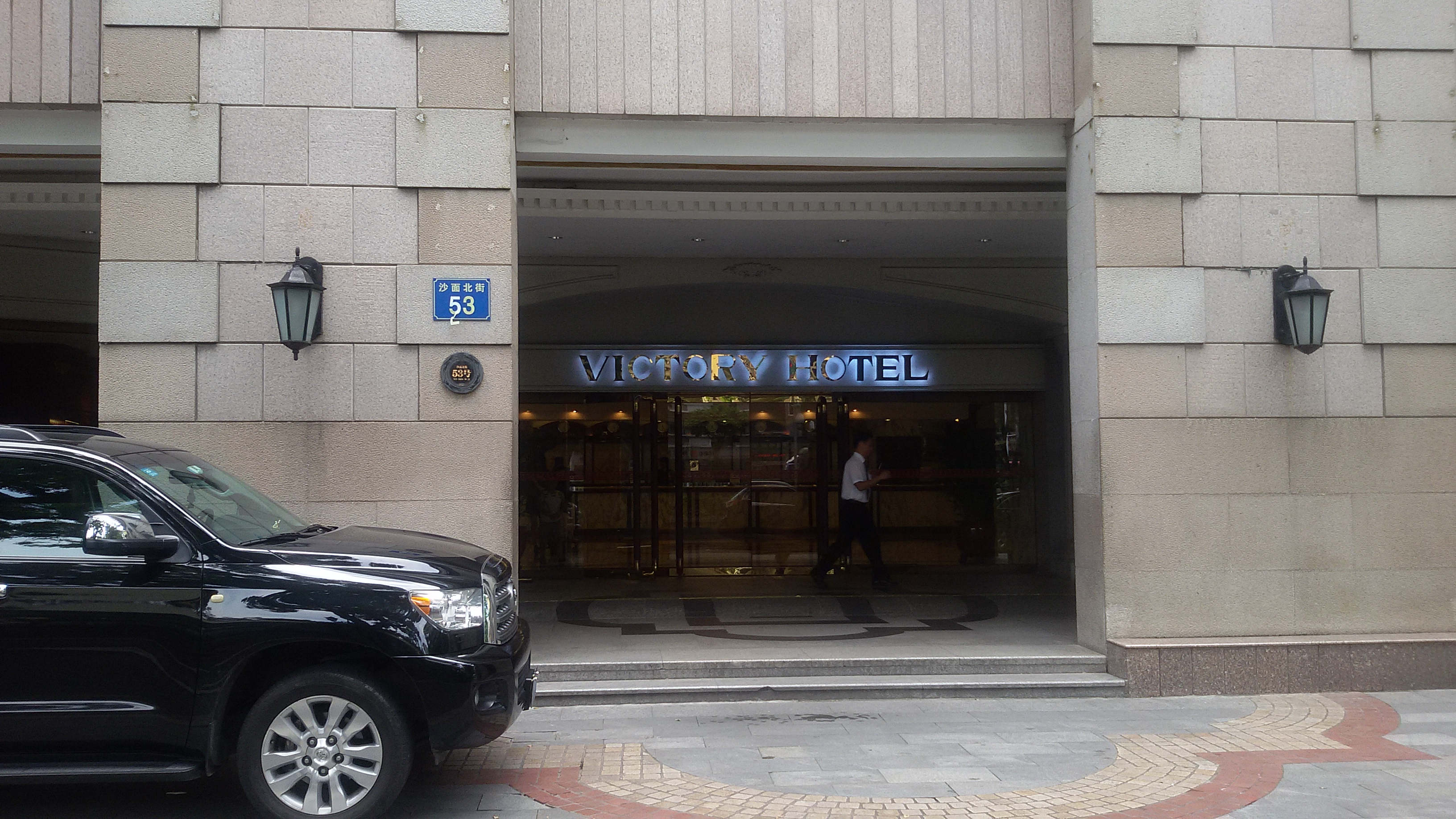 粵語: 广东胜利宾馆